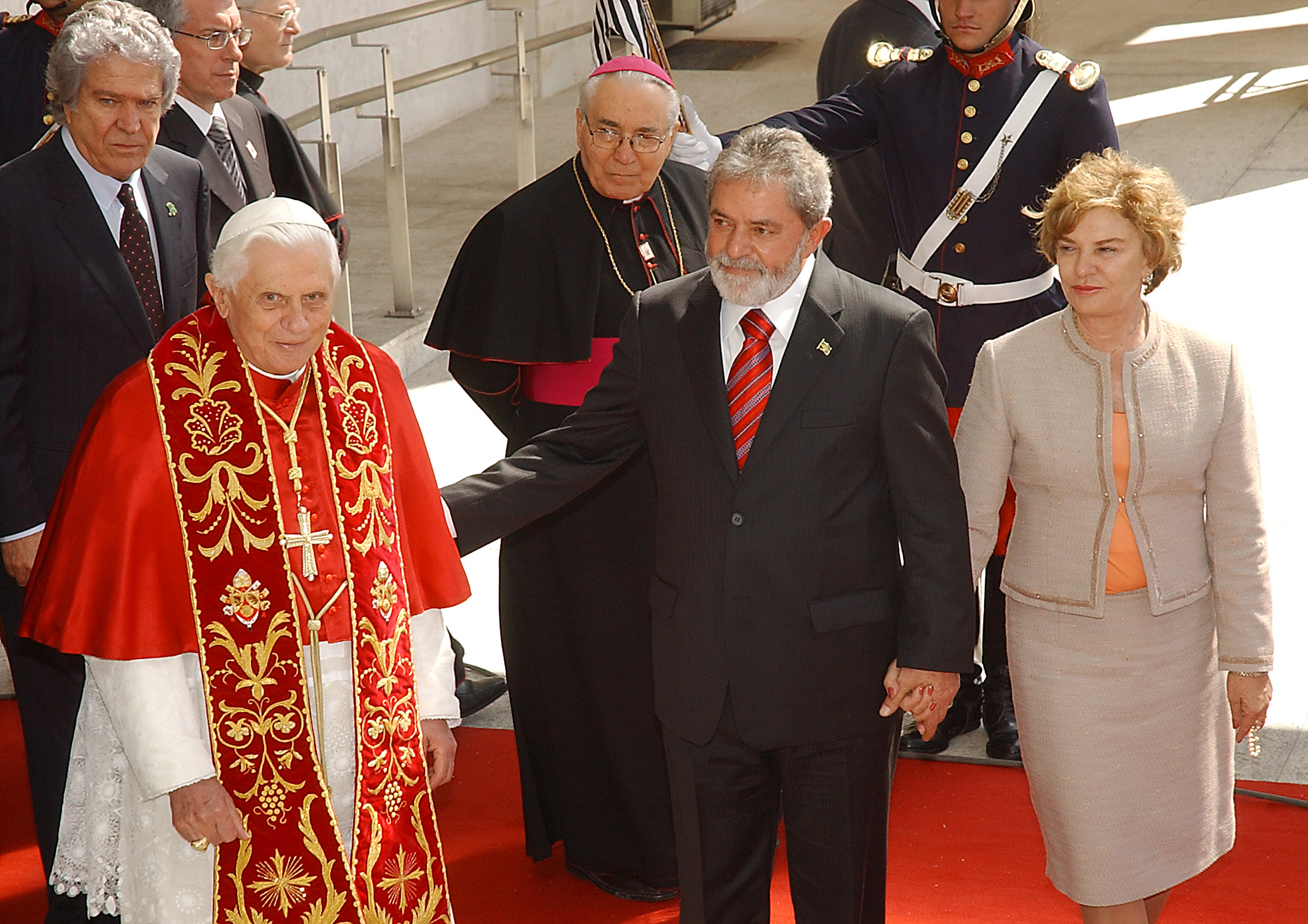 Papa Bento XVI chega ao Palácio dos Bandeirantes, residência oficial do governador do estado de São Paulo.